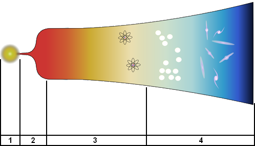 Shéma représentant quelque points-clé de l'évolution de notre univers